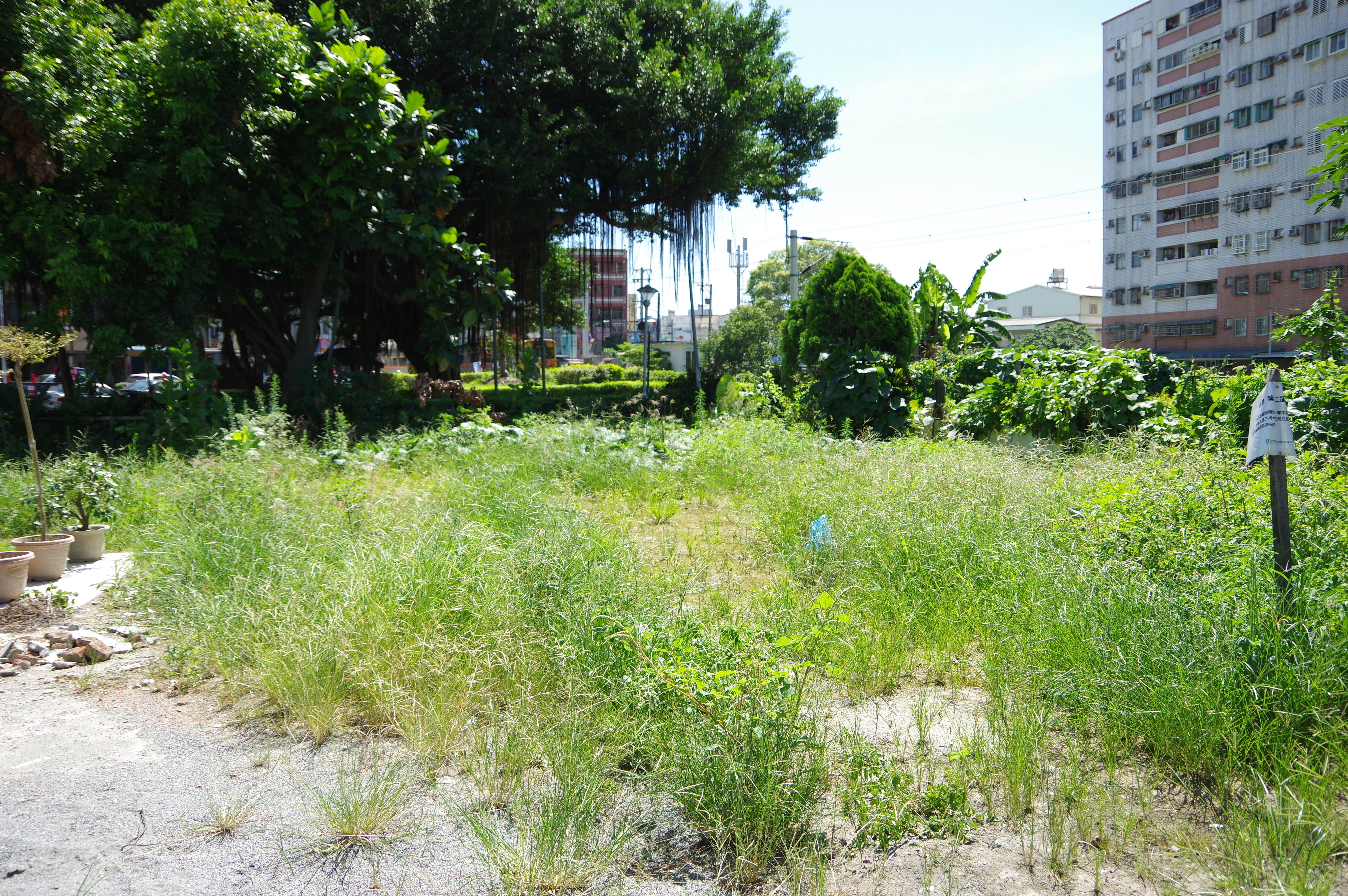 已廢除的臺灣鐵路管理局臺東線田浦車站舊址於2014年6月的狀況。